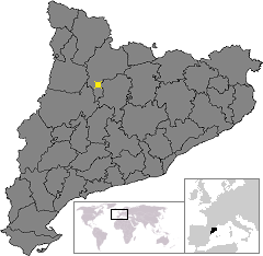 Localització d'Oliana . Location of Oliana in Catalonia.